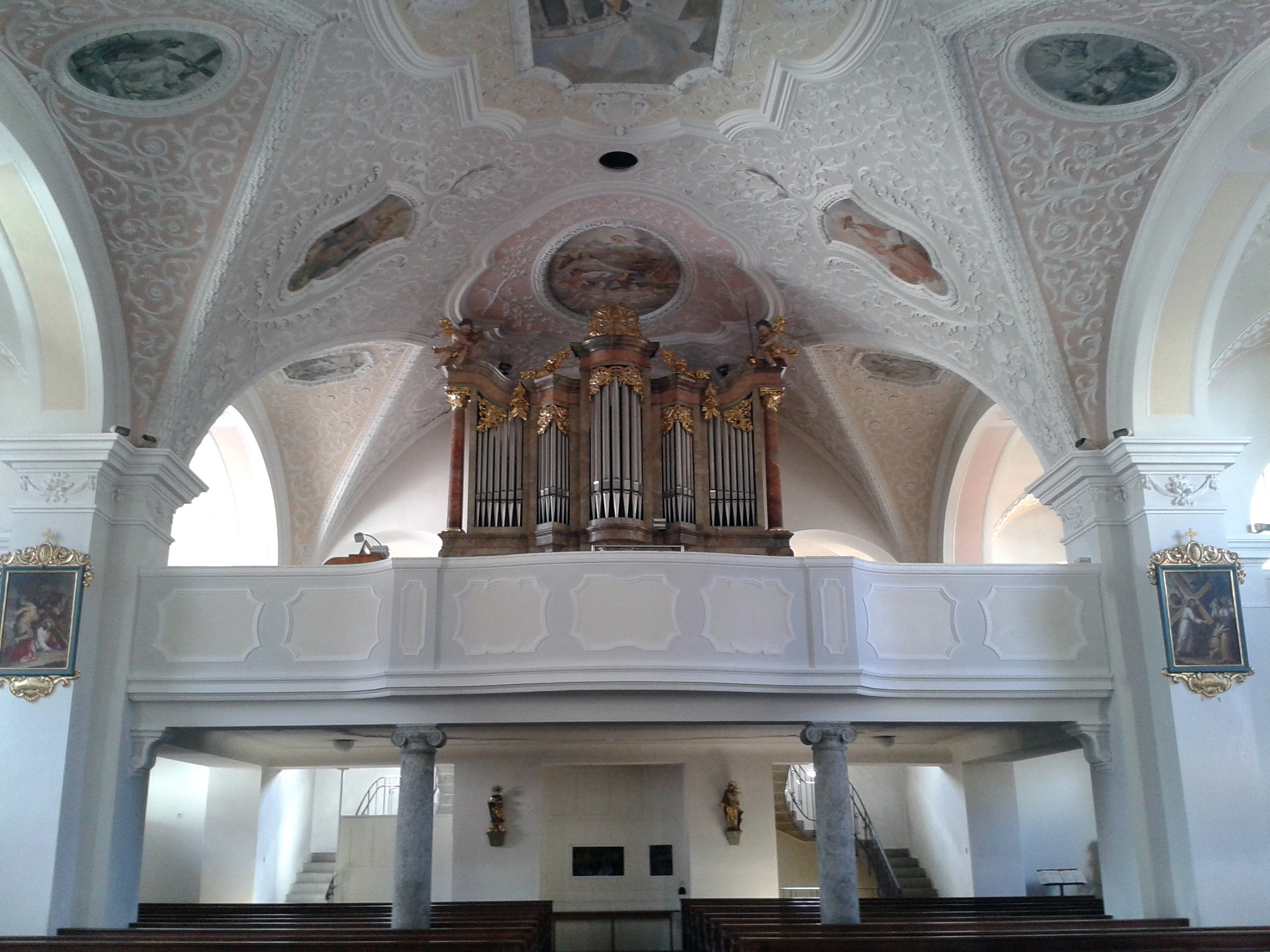 Orgel der Kirche Wolnzach